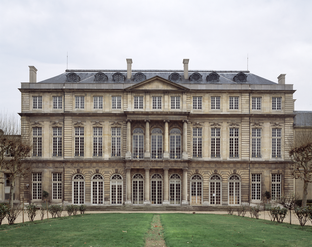 Vue générale de l'hôtel de Rohan, qui abrite les Archives nationales depuis le départ de l'Imprimerie nationale.